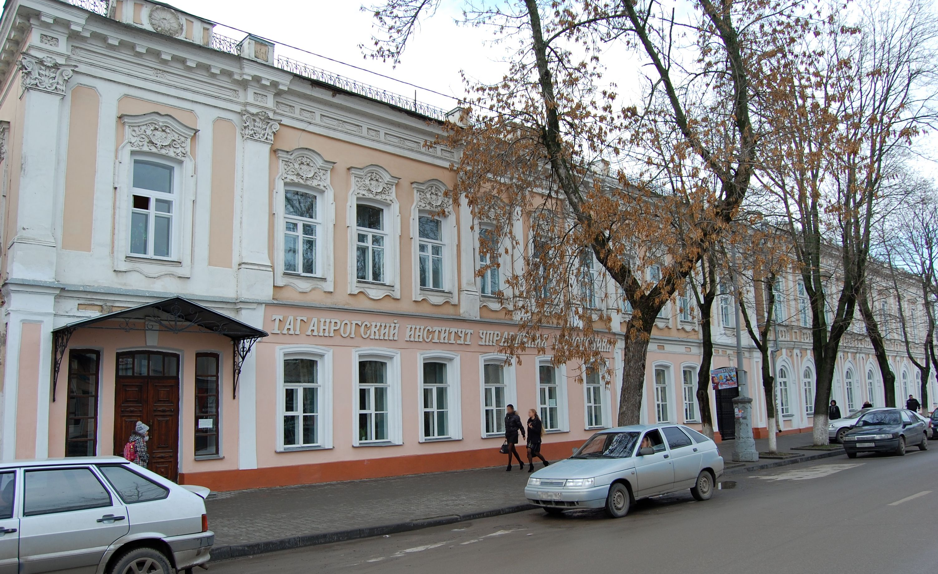 Таганрогский институт управления и экономики. Таганрог, ул. Петровская, 45